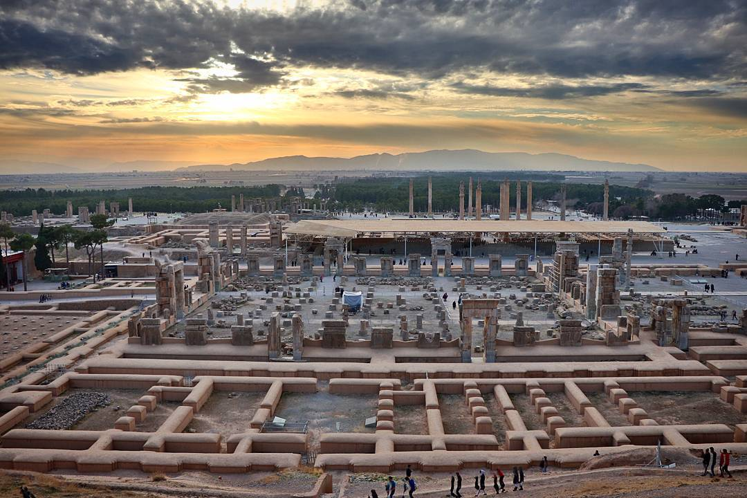 تخت جمشید